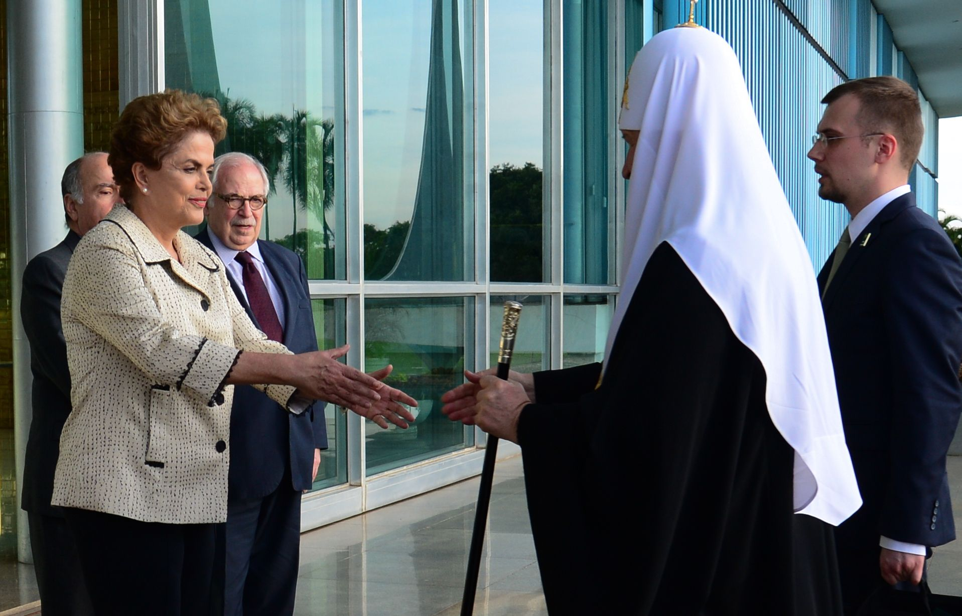 Brasília - A presidenta Dilma Rousseff e o ministro das Relações Exteriores, Mauro Vieira, recebem o patriarca Cirilo da Igreja Ortodoxa Russa, no Palácio da Alvorada.